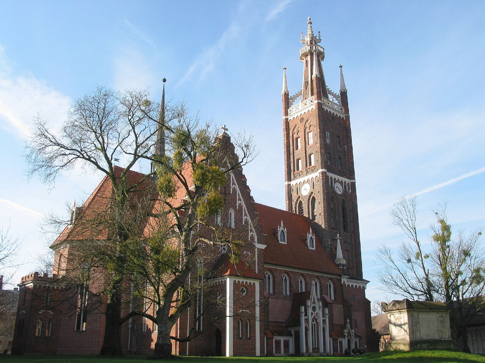 St. Petrikirche Wörlitz